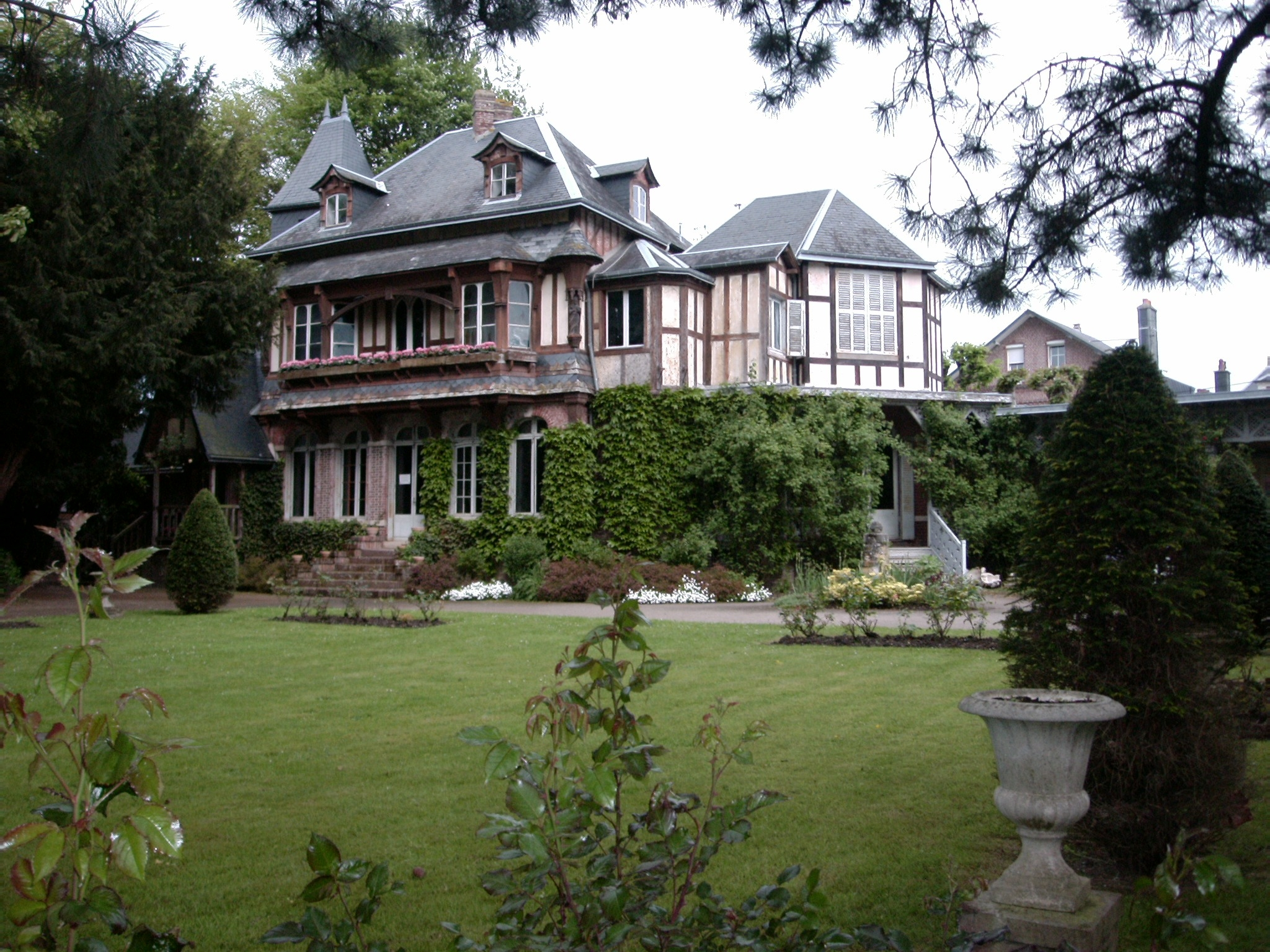 Das Haus des Schriftstellers Maurice Leblanc in Etretat; heute Museum Datum: 02.05.2011 Urheber: M. Pfeiffer alias Gordito1869 Quelle: privates Fotoarchiv des Urhebers